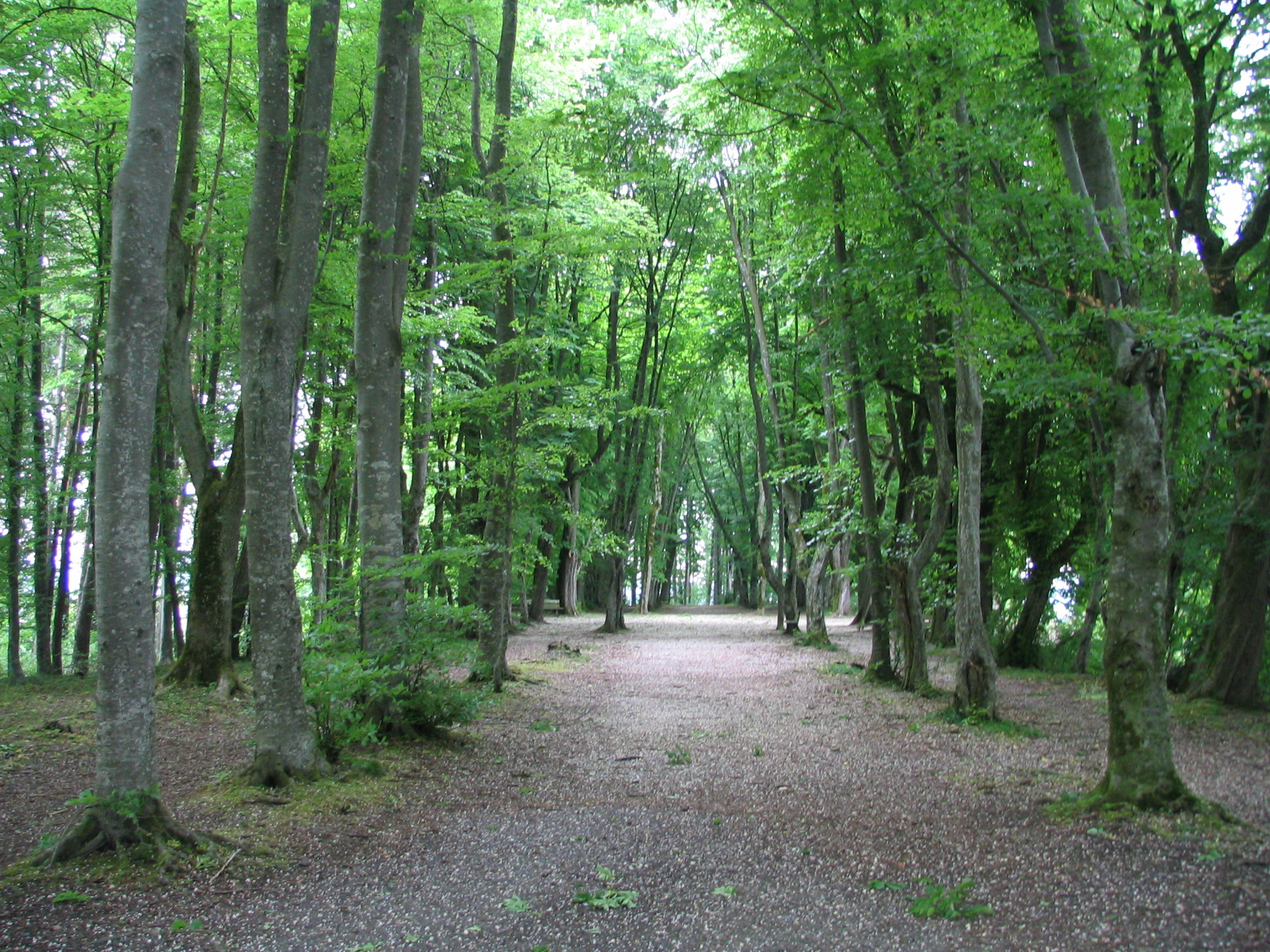 Sogenannte Waldkathedrale des Stifts Beromünster